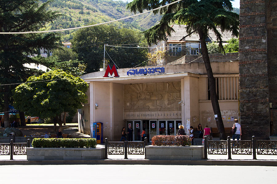 Tbilisi, Rustaveli Metro Station